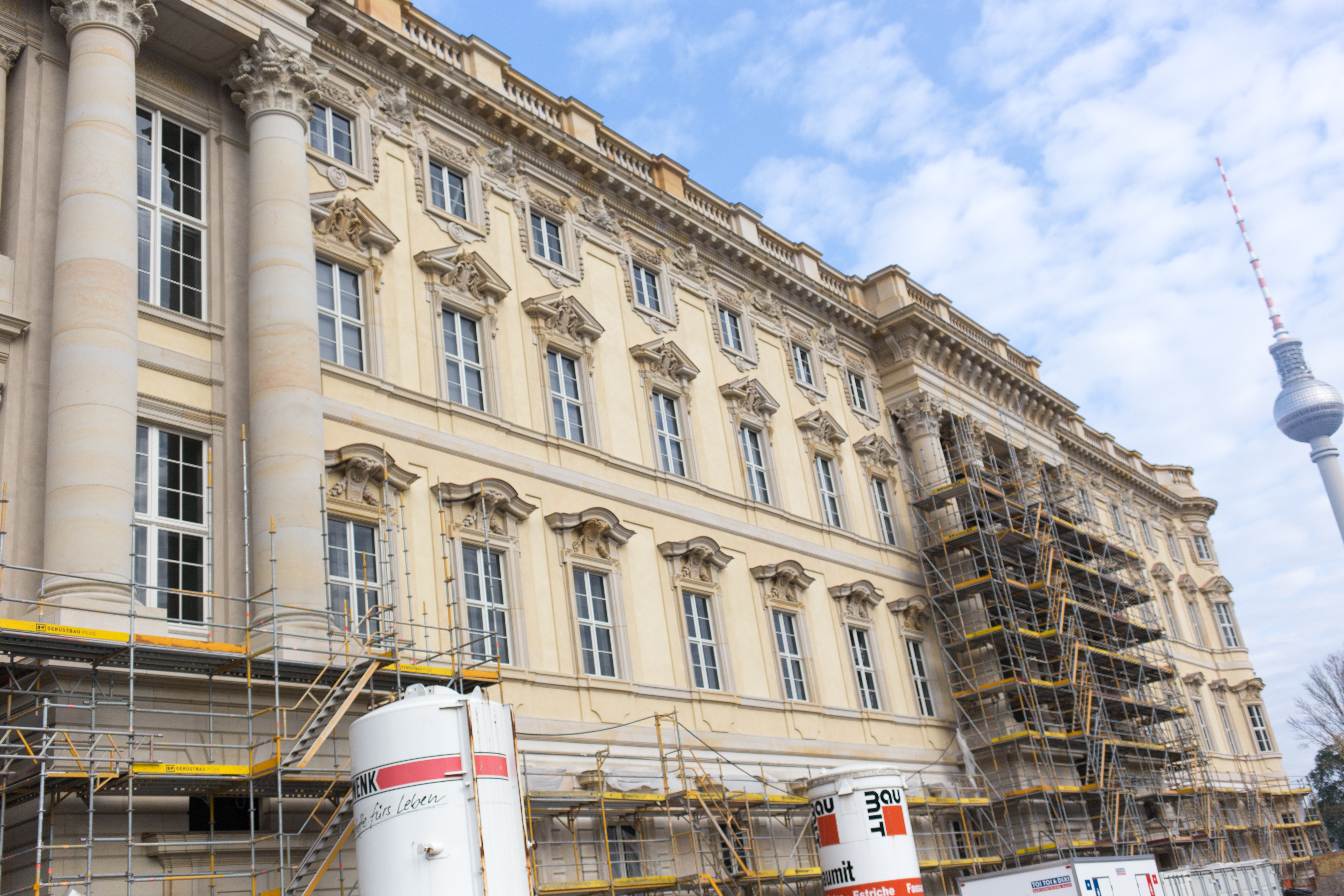 Wikipedia KulTour im Humboldt Forum